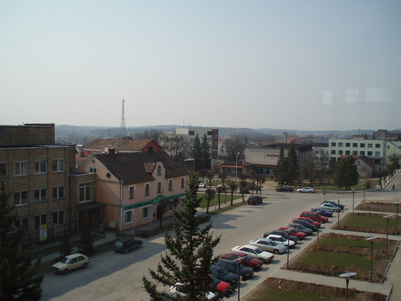 Skats uz Madonu no Saieta nama. 2006. gada 28. aprīlī.